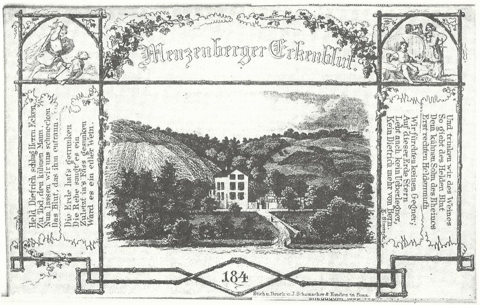 Weinberge im Tal von Menzenberg mit Karl-Simrock-Haus (Stich), Honnef